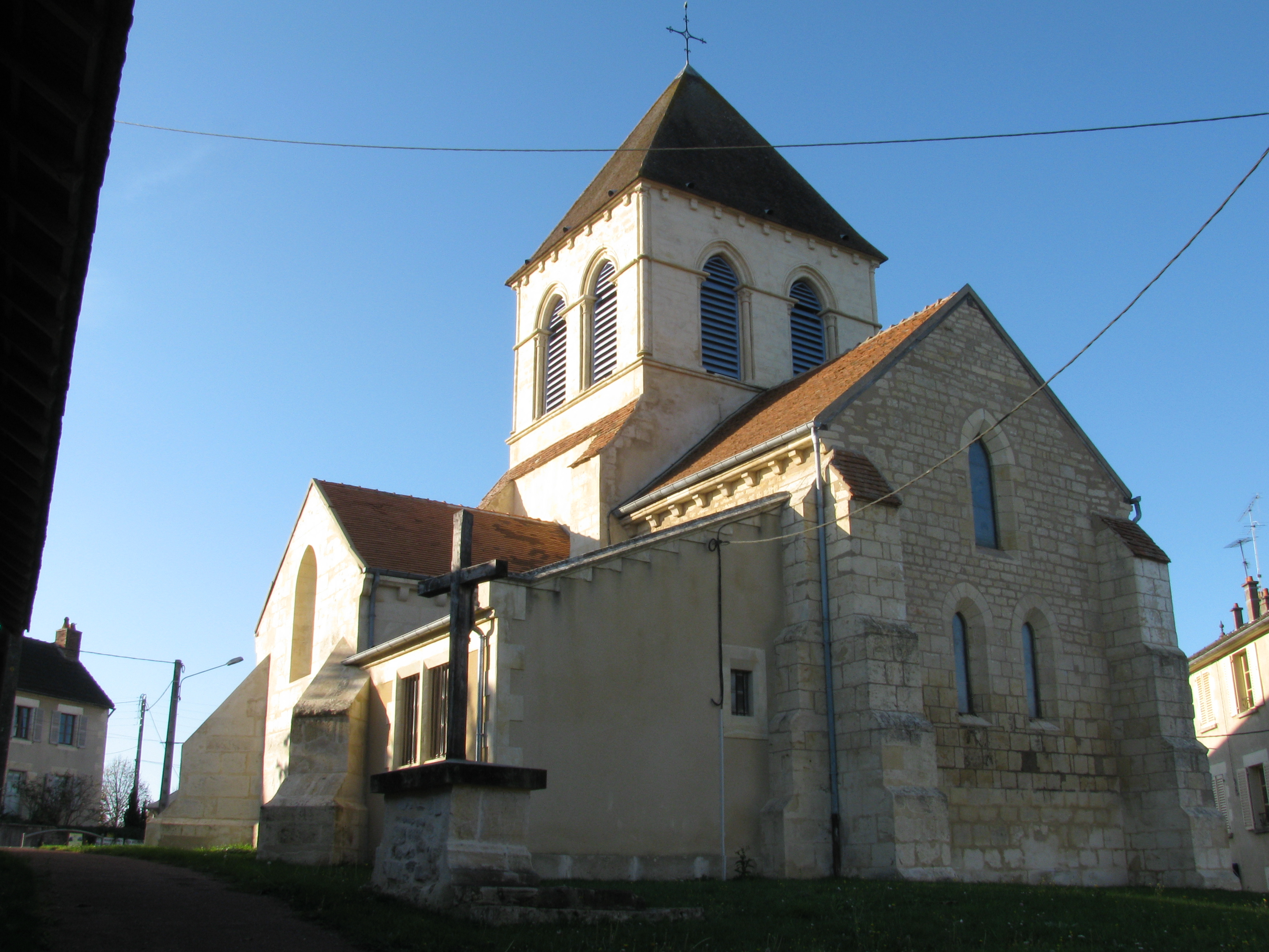 Église Saint-Martin, à Chevenon, Nièvre, France.